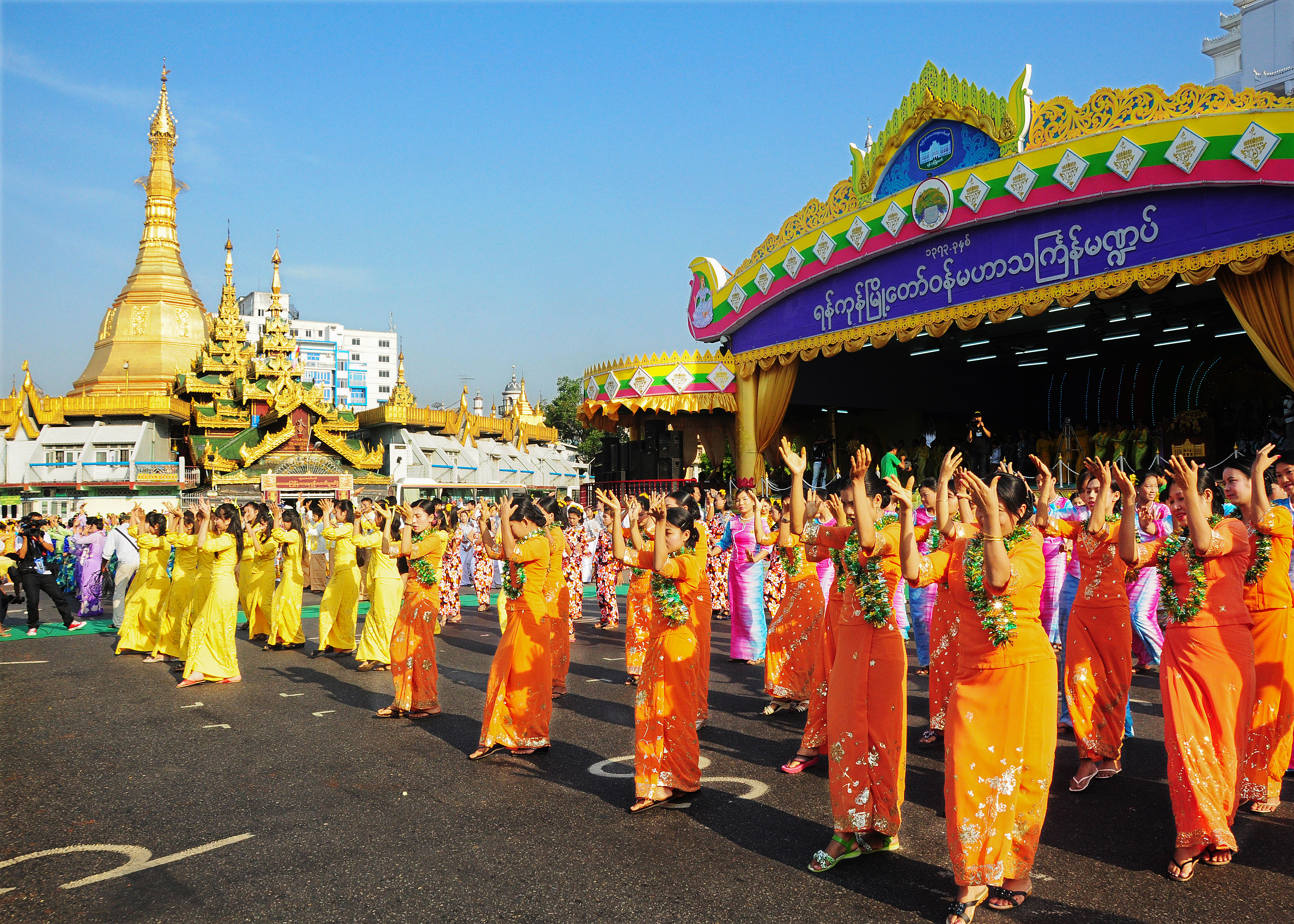 မြန်မာဘာသာ: သင်္ကြန်ပွဲတော်